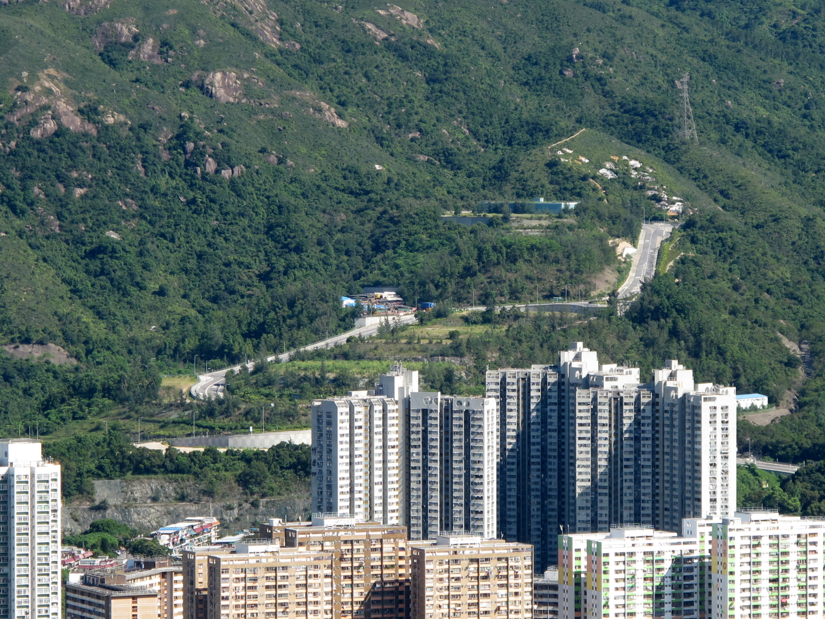 Shui Chuen O